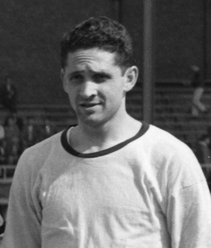 Willy Erkens in 1961.